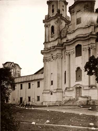 Петрапаўлаўская базыльянская царква (у 1930-ыя гг. – гарнізонны касцёл Корпуса Аховы Памежжа). Фота з альбома вядомага глыбоцкага фатографа Леанарда Рачыцкага, 1930-ыя гг.